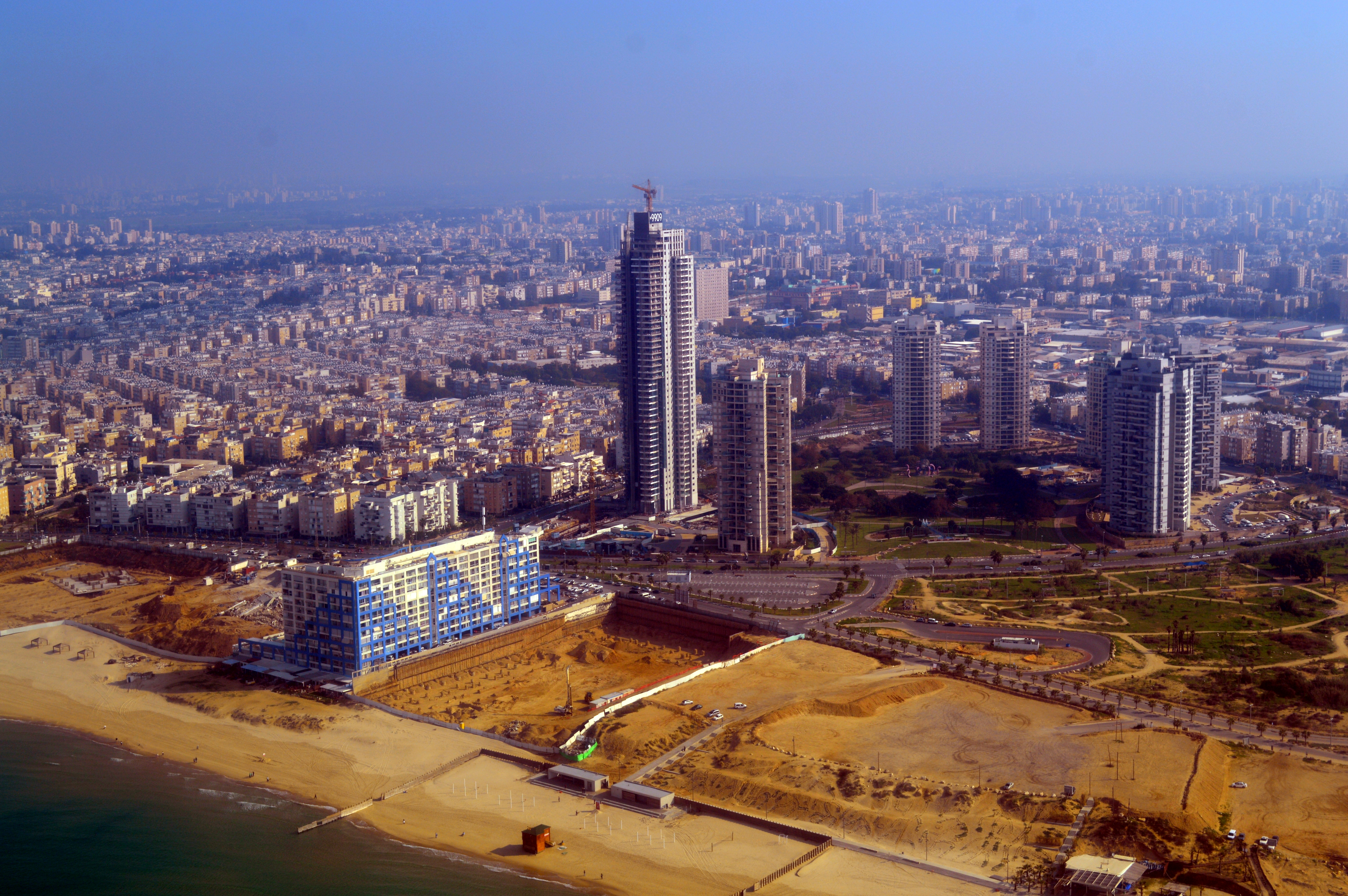 צילום אוויר - בת ים משמאל למבנה המלון הכחול ניתן לראות את הריסותיו של מלון סאן המבנה הגבוה במרכז התמונה הוא מגדל נווה נוף - מגדל המגורים הגבוה ביותר בישראל, נכון ל-2013.